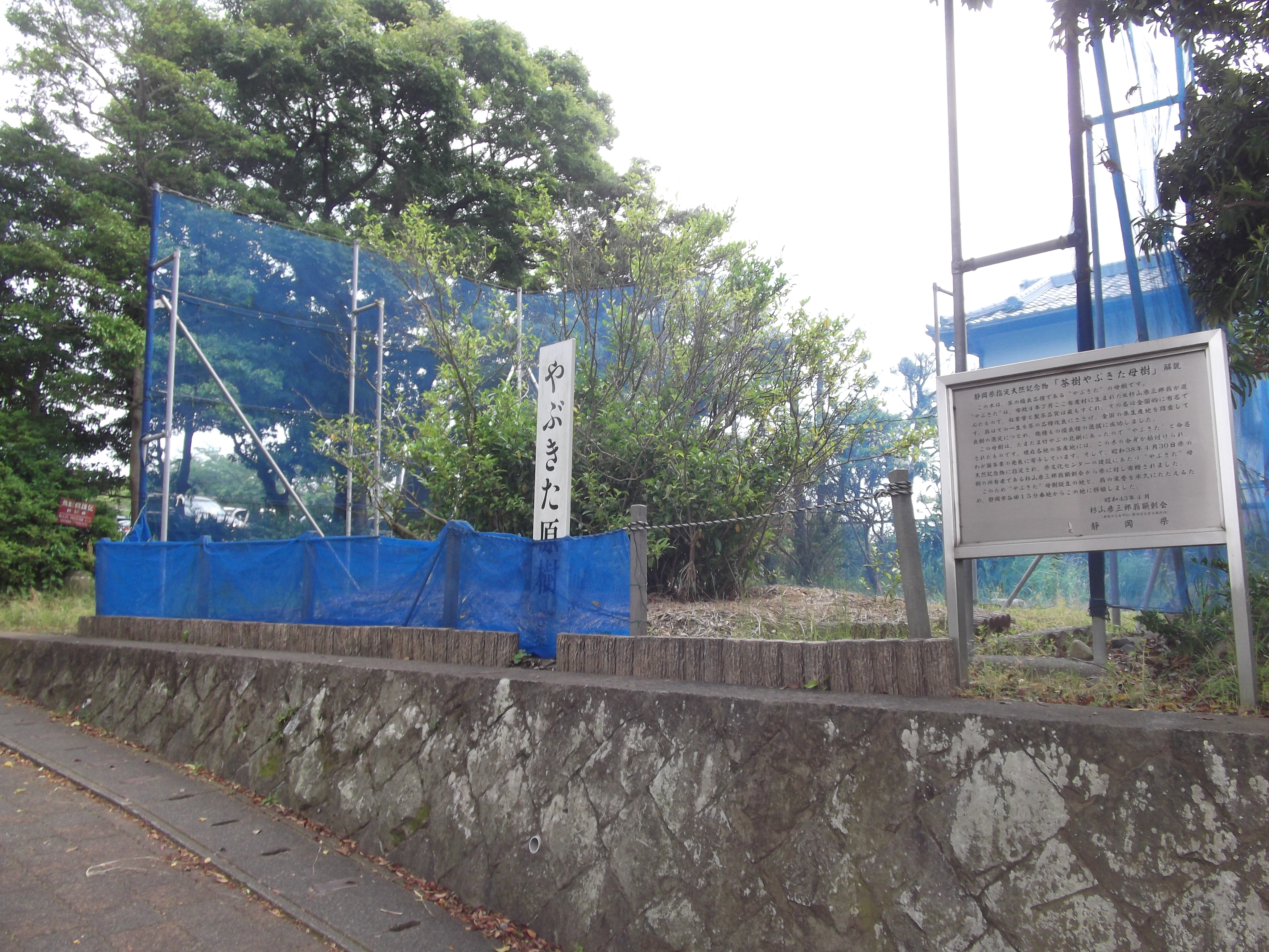 やぶきた種母樹。静岡市駿河区谷田にある。